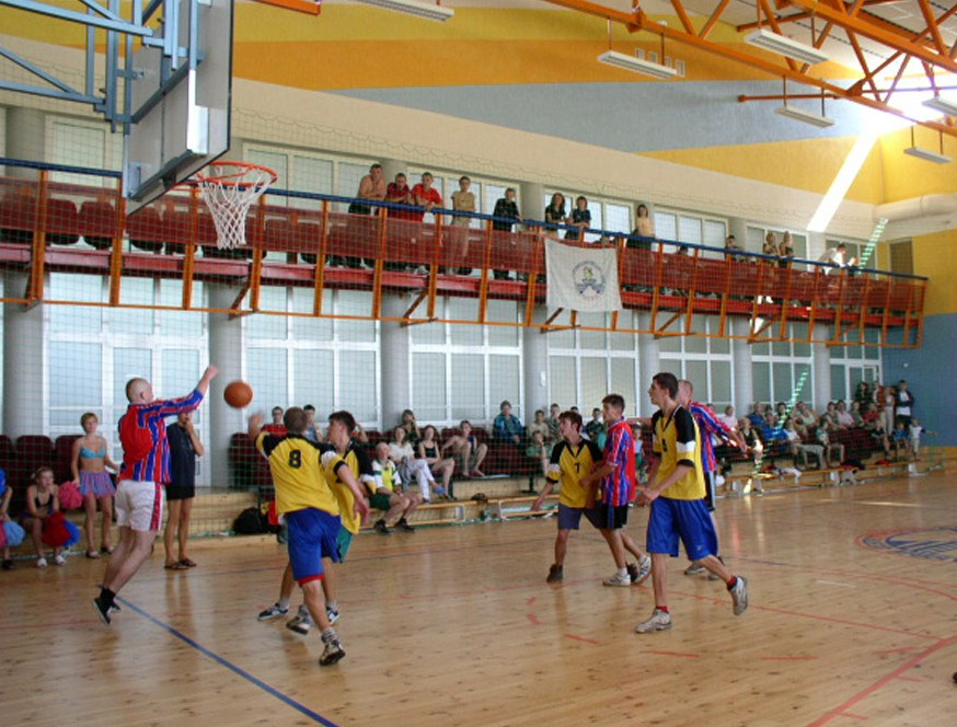 Der Sport steht in Nadeshda hoch im Kurs und gehört zum Bildungskonzept